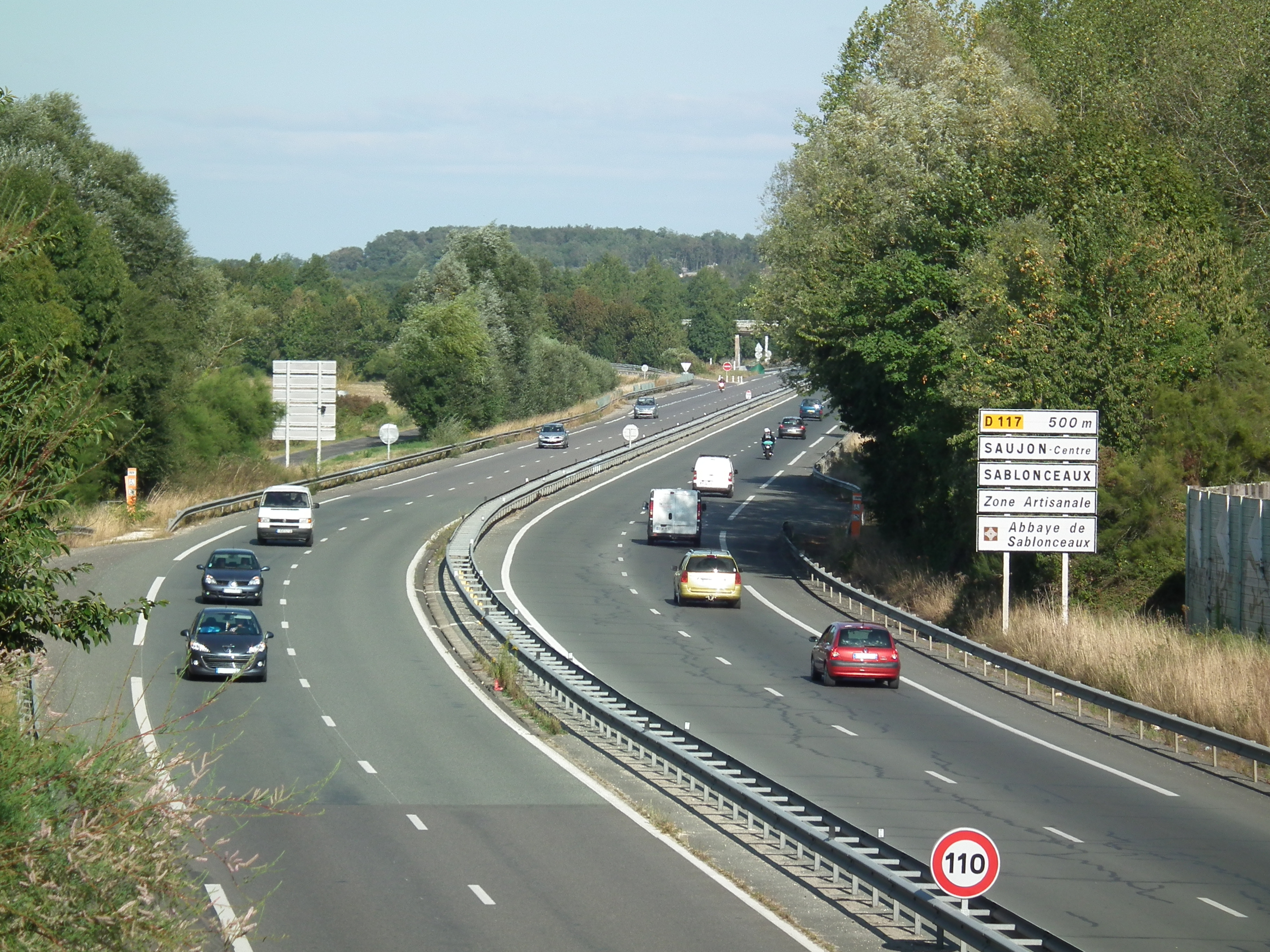 La rocade de Saujon (RN 150)